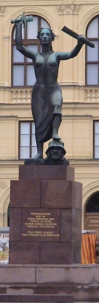 Staty över den fredliga unionsupplösningen mellan Sverige och Norge 1905. På stora torget i Karlstad.